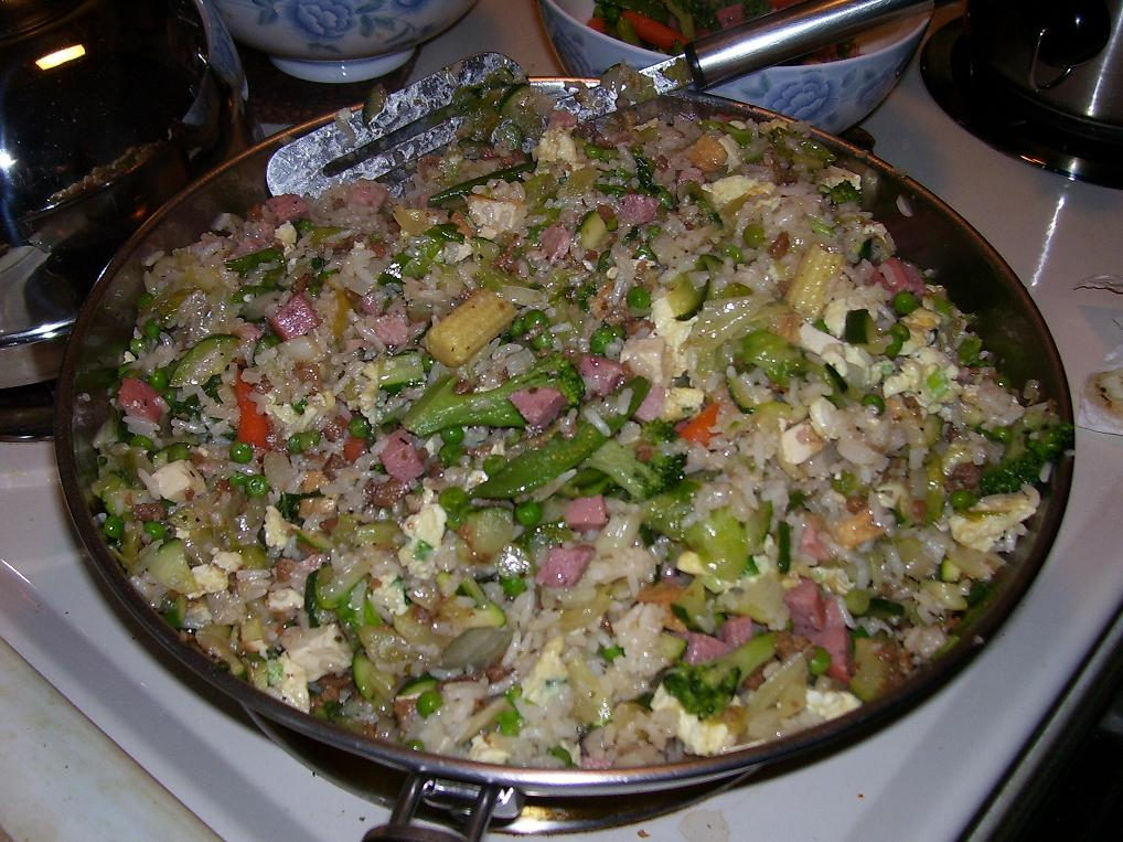 arroz frito con diferentes ingredientes. Fried Rice with various ingredients.